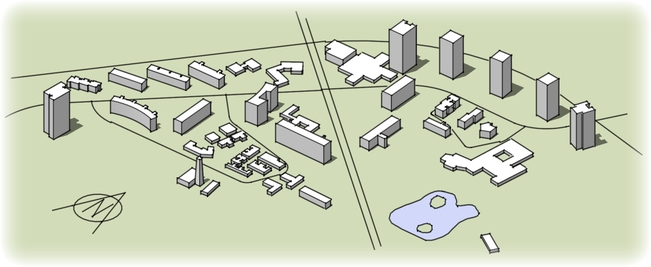 Lageplan Interbau (IBA 1957)